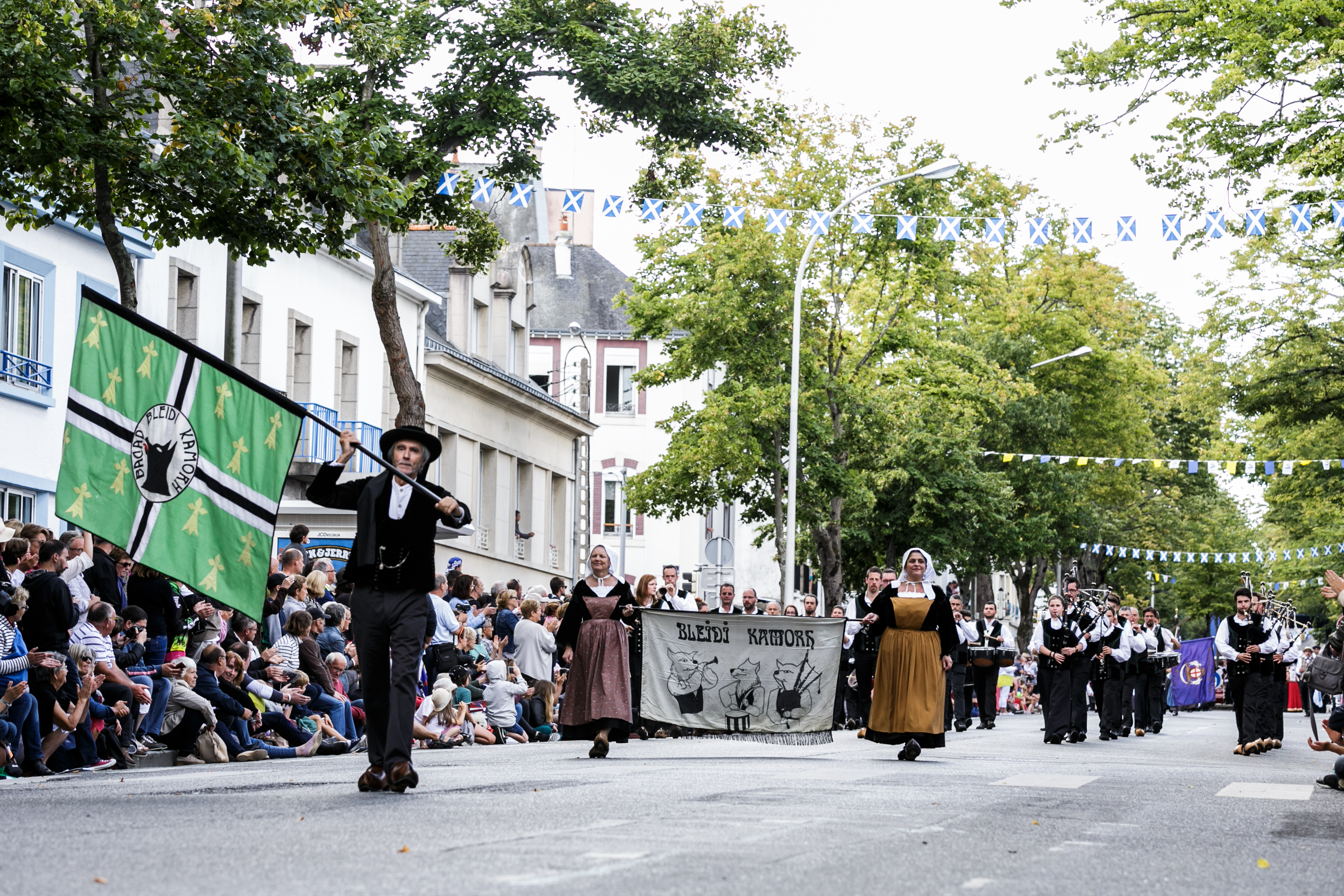 Festival Interceltique de Lorient 2017 - Grande parade des nations celtes - Bagad Bleidi Kamorh (Camors)